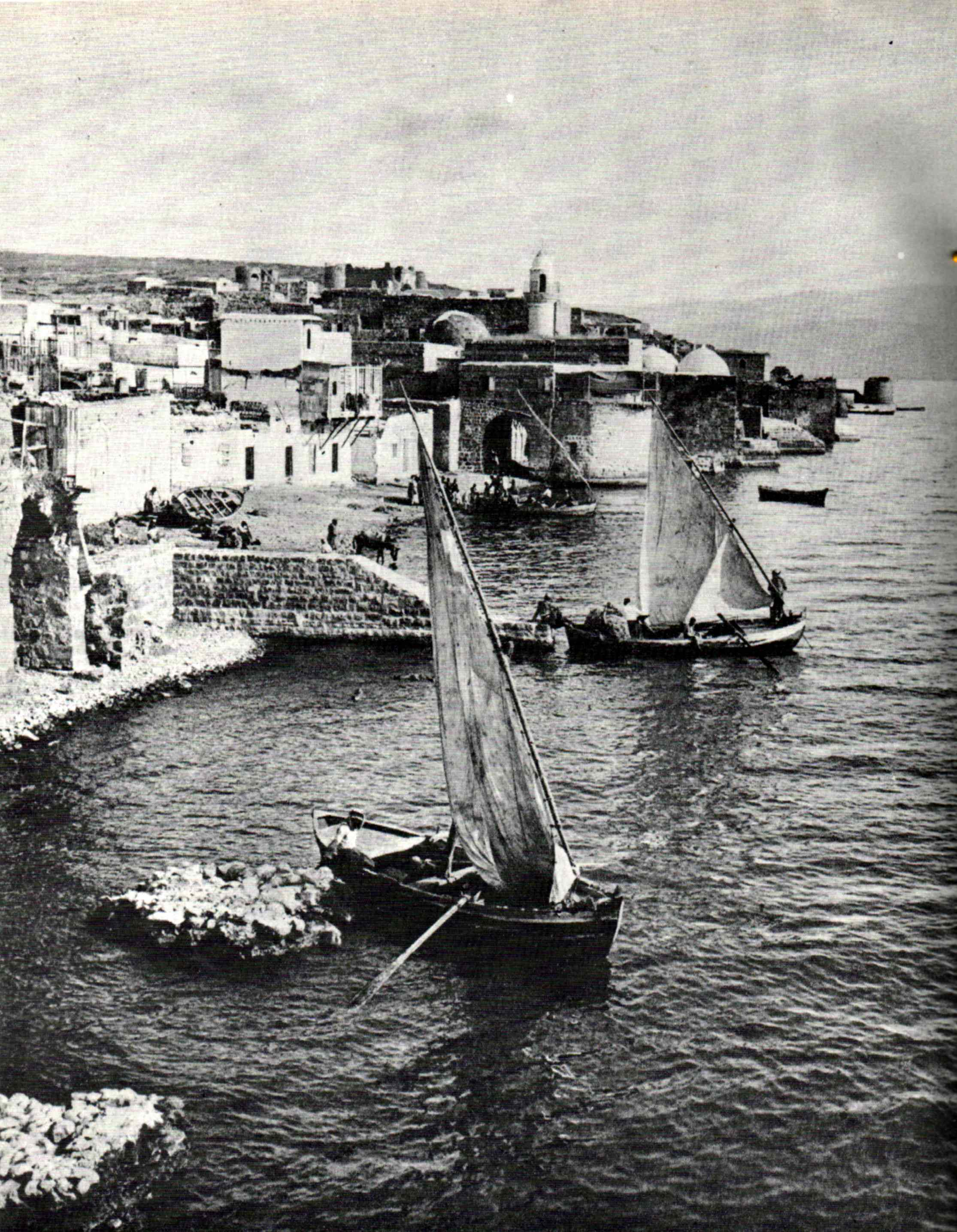 Tiberias, 1928